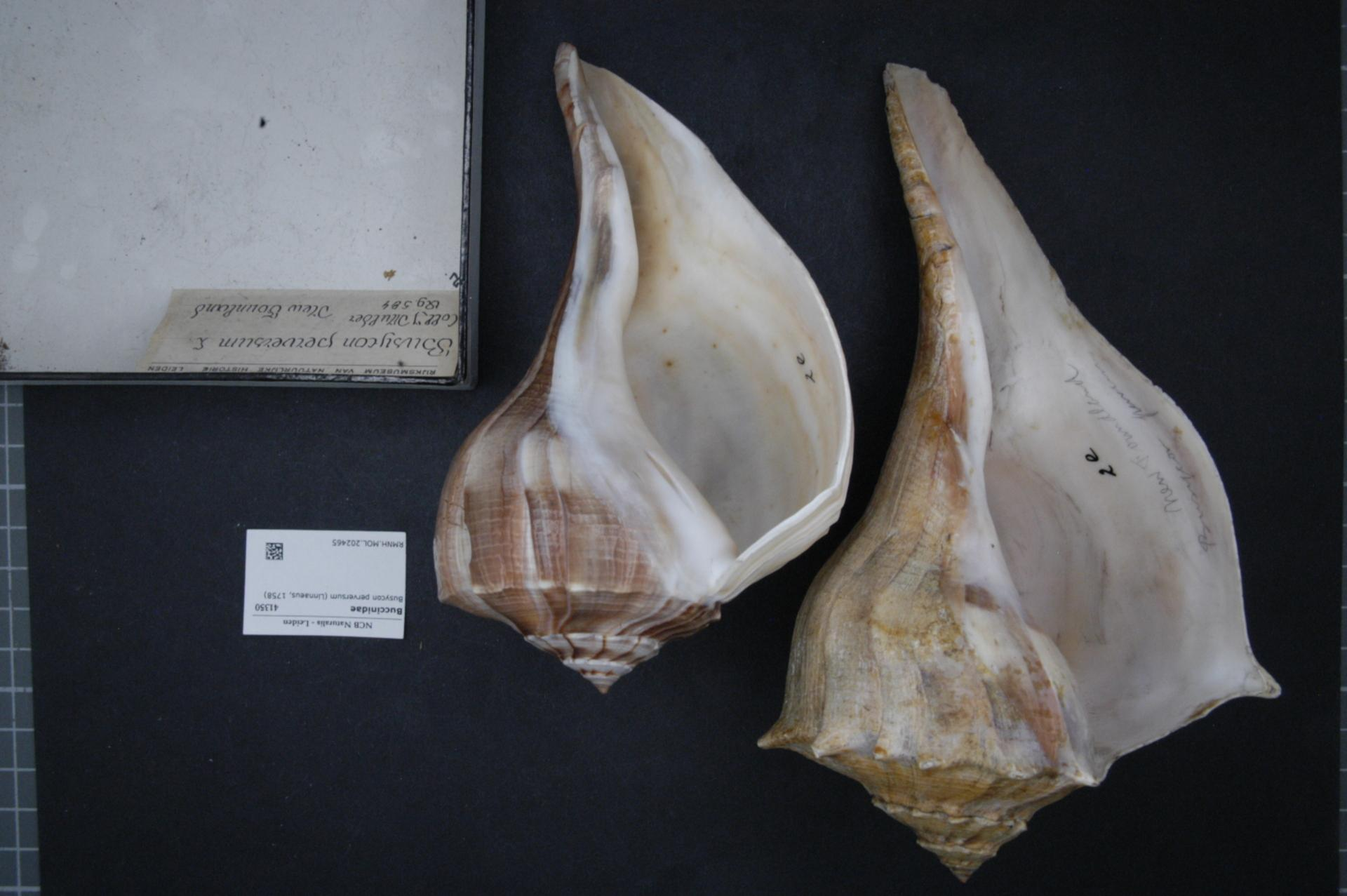 Busycon perversum (Linnaeus, 1758)